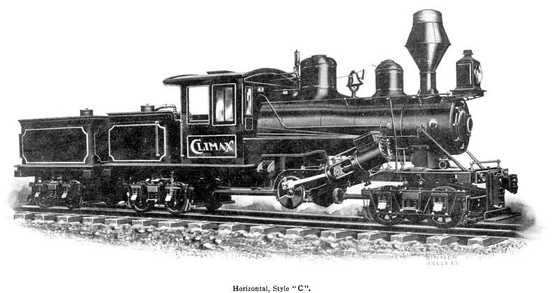 Climax-Lokomotive der C-Klasse. Katalog-Bild der Climax Manufacturing Company.